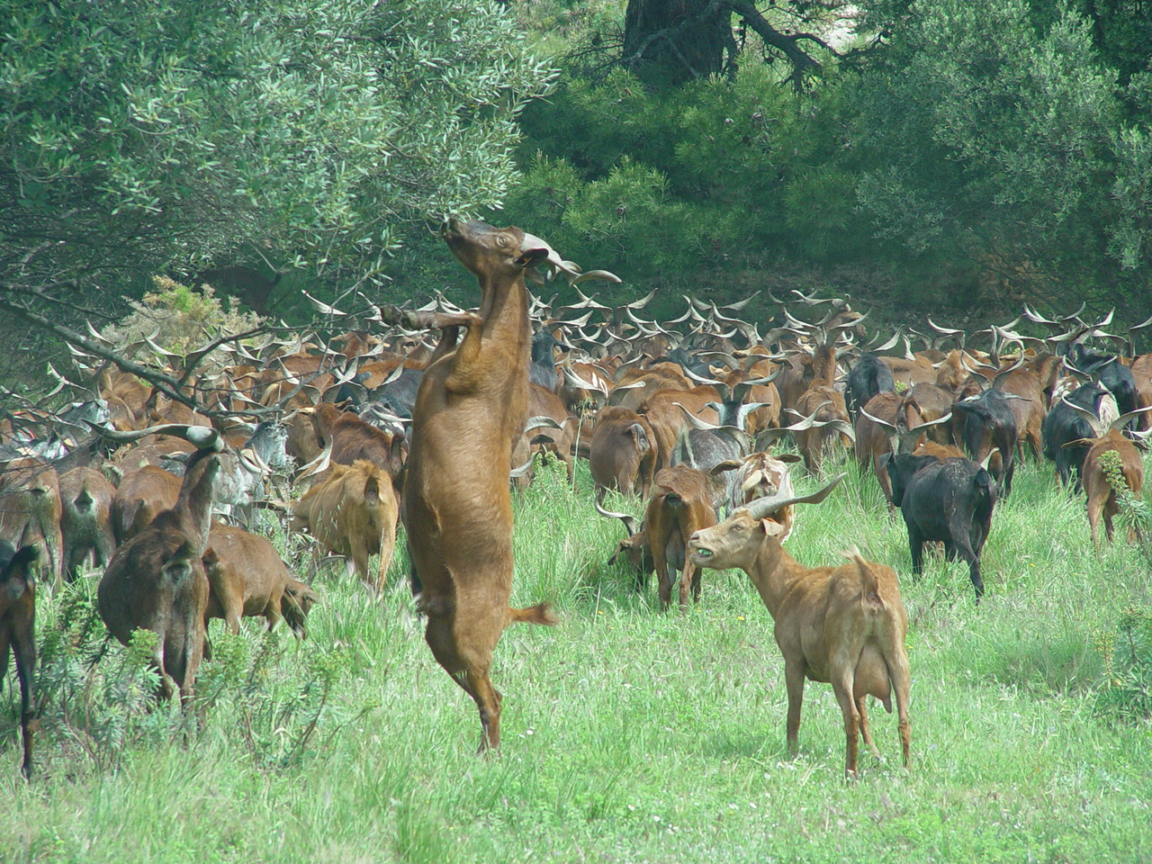 Troupeau de chèvres du Rove dans la garrigue au dessus du village du Rove (Bouches du Rhône, France)